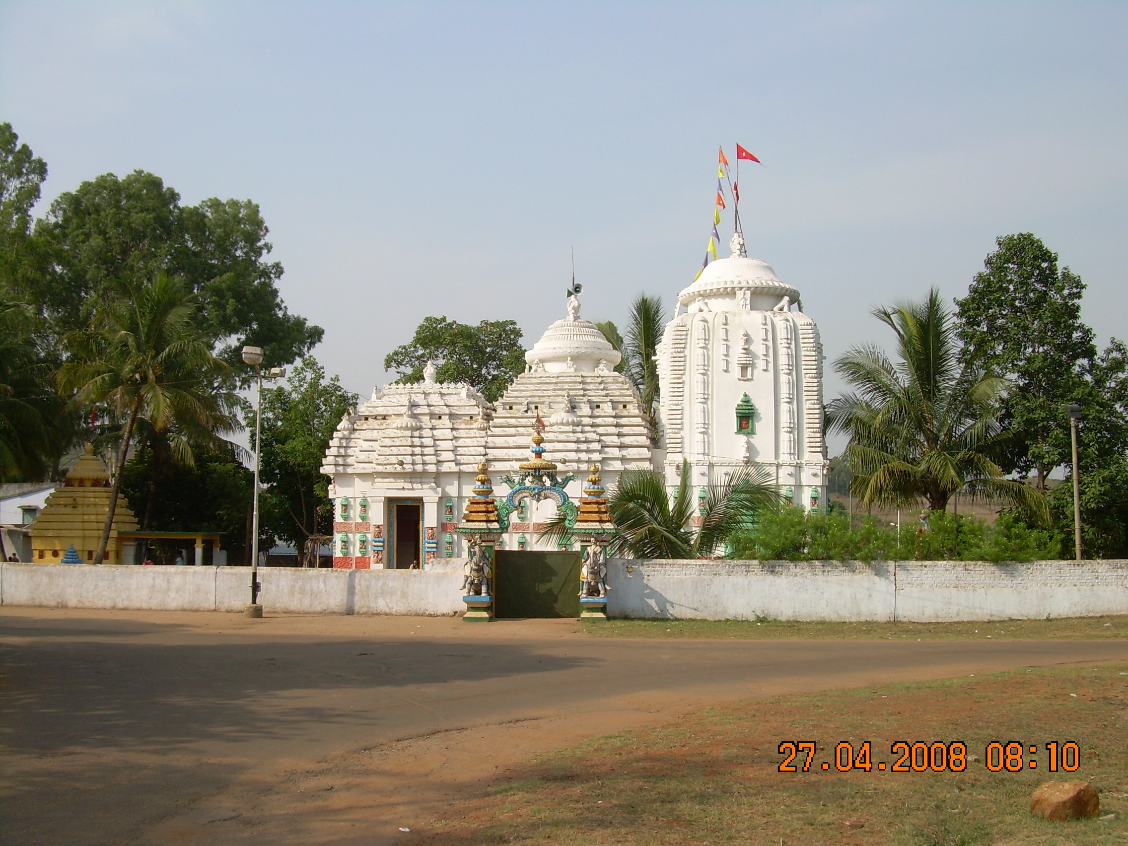 Sunabeda-2 Templ 1